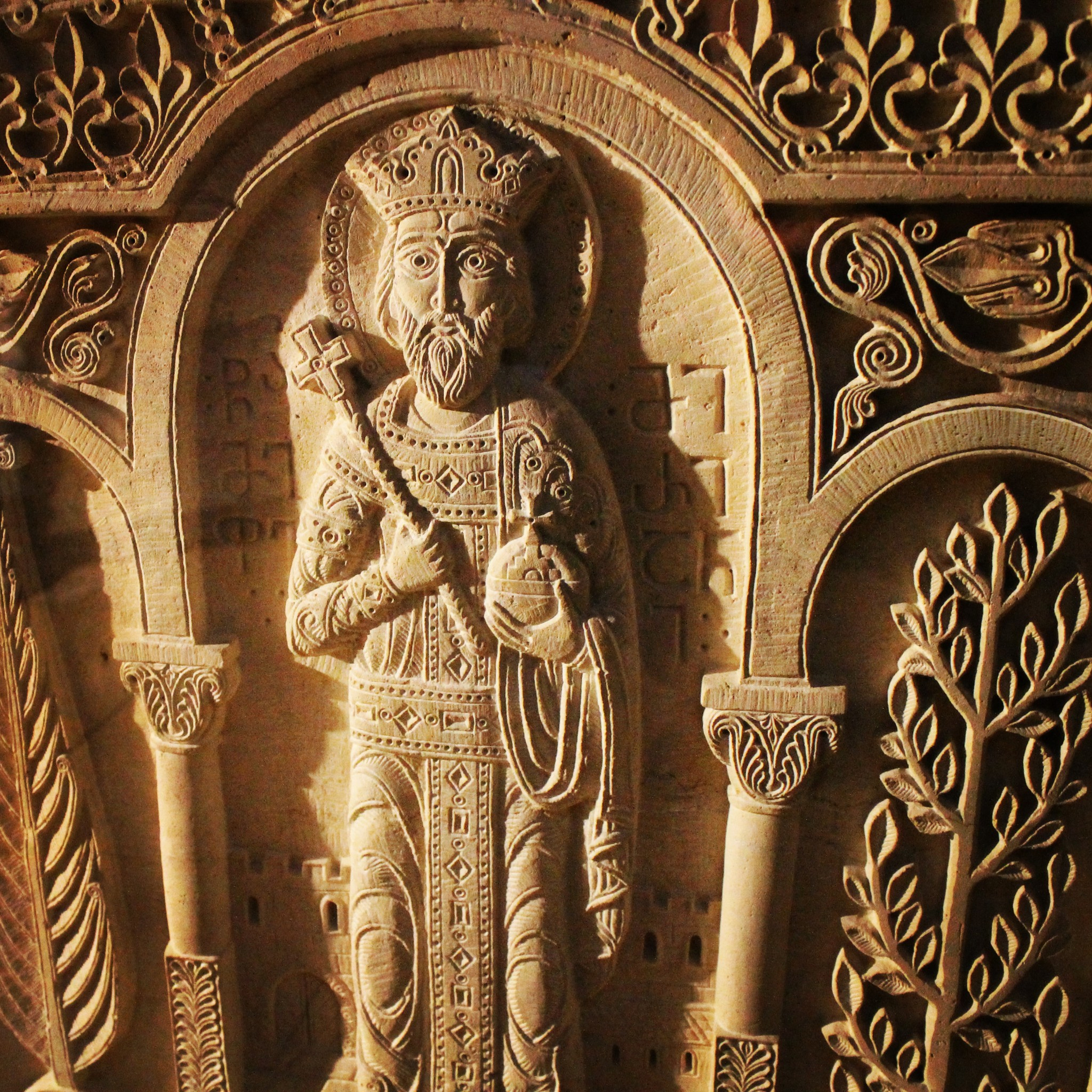 IMG_20130418_092737